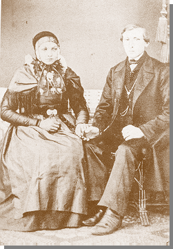 Tracht aus Haldem, heute Gemeinde Stemwede, NRW, evtl. Hochzeitsbild